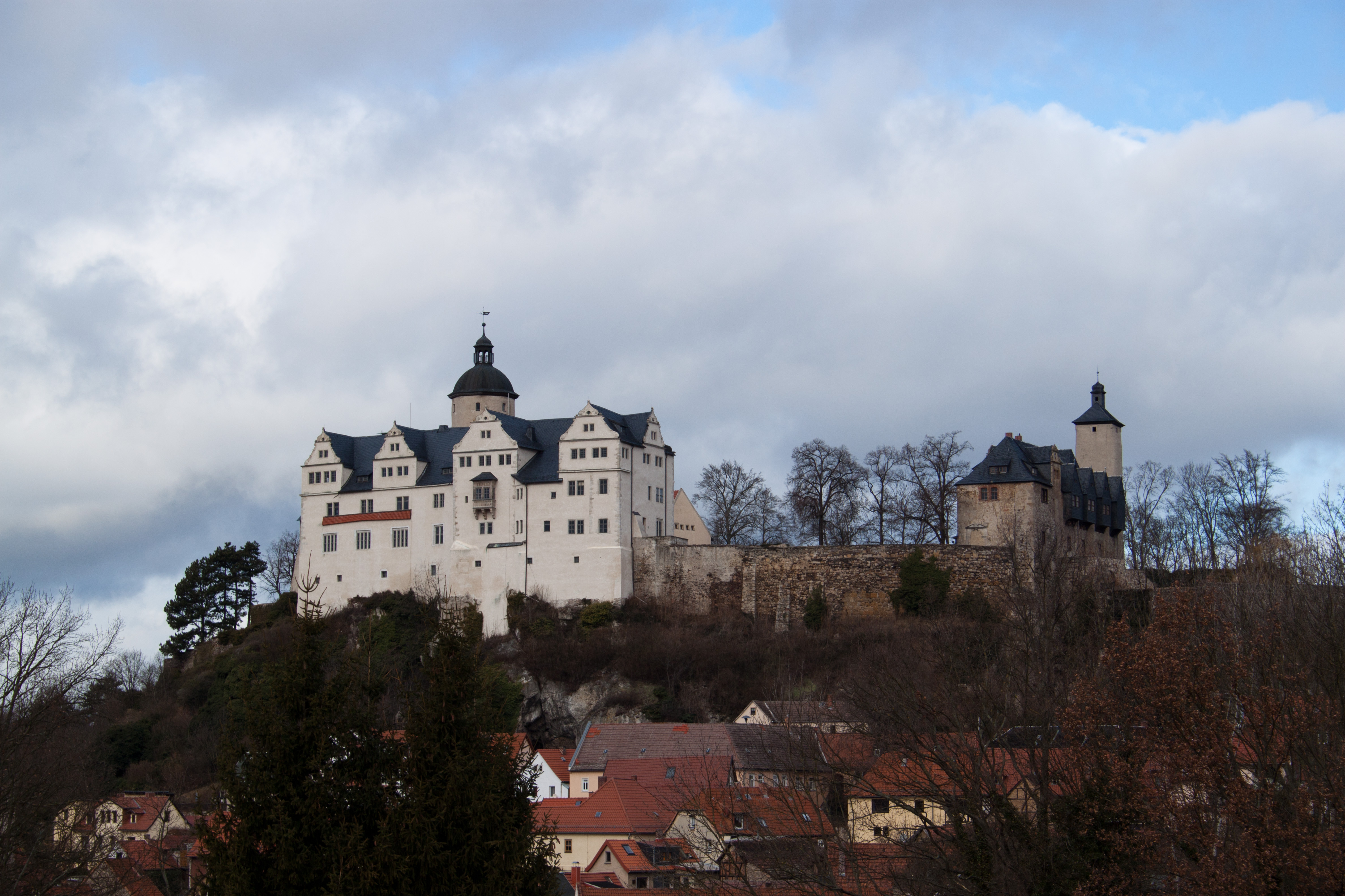 Die Burg Ranis von der Stadtwiese aus gesehen.